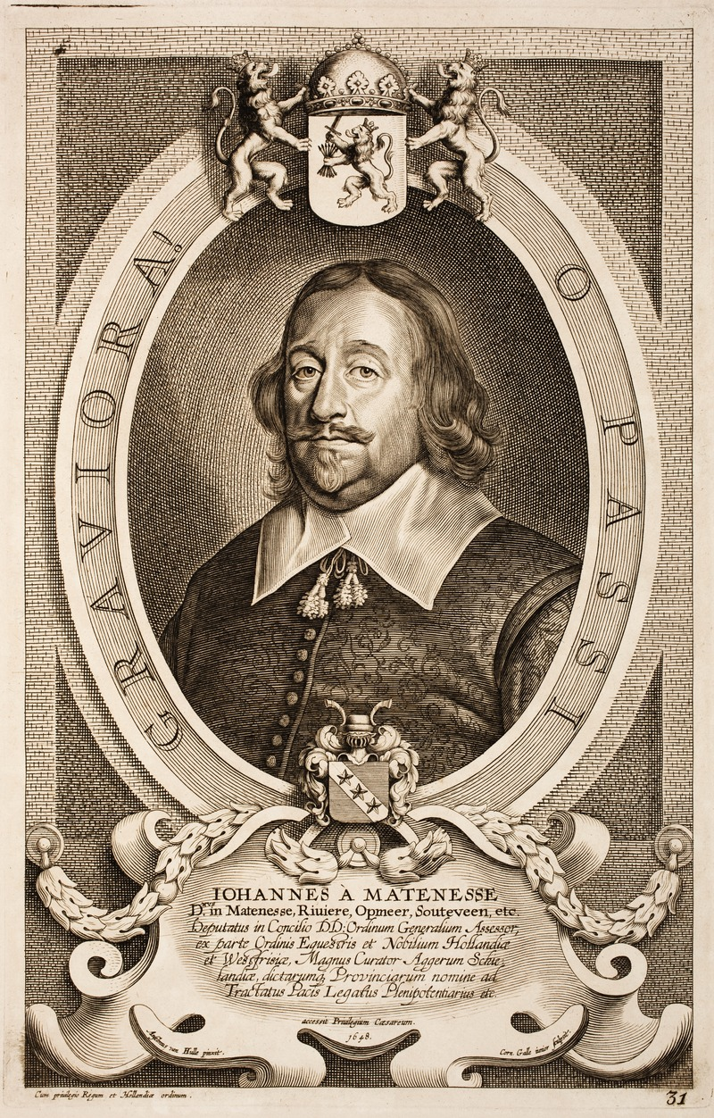 Johan van Mathenesse (1596-1653), niederländischer Gesandter beim Westfälischen Friedenskongress